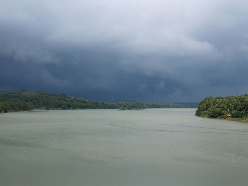 Chaliyar - Rain